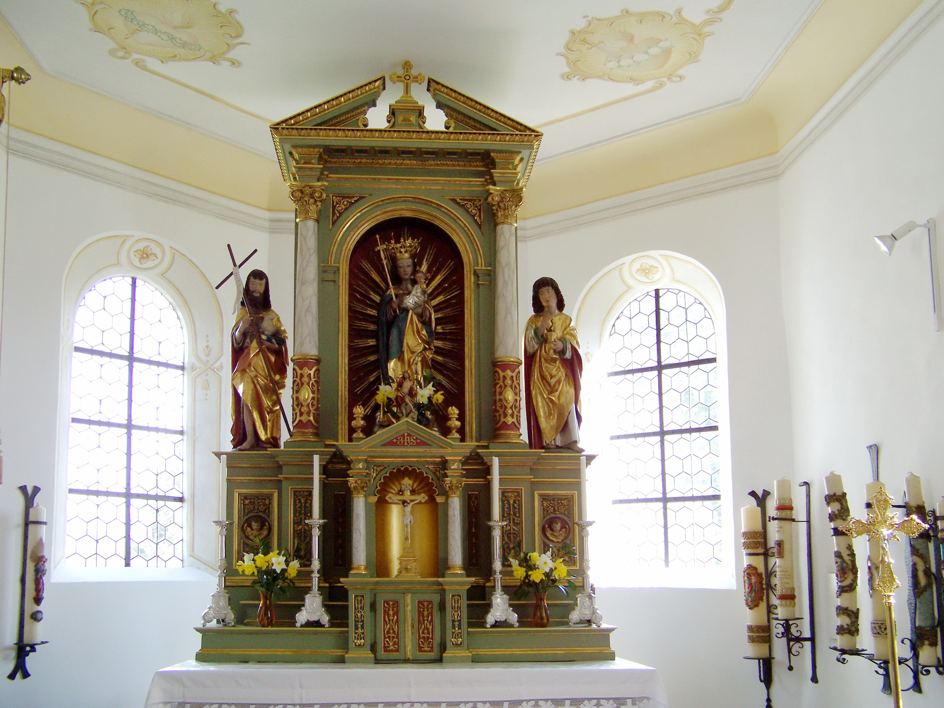 Weihmichl, Stollnried, Kirchstraße 5. Wallfahrtskirche Mariä Himmelfahrt. Saalkirche mit eingezogenem Chor, Anlage des frühen 14. Jahrhunderts, Verlängerung des Schiffes nach Westen 1847. Zweisäuliger Altaraufbau mit moderner Renaissancedekoration und guten spätgotischen Holzfiguren. In der Mitte St. Maria mit dem Jesuskinde. Ehemals Gnadenbild um 1500.